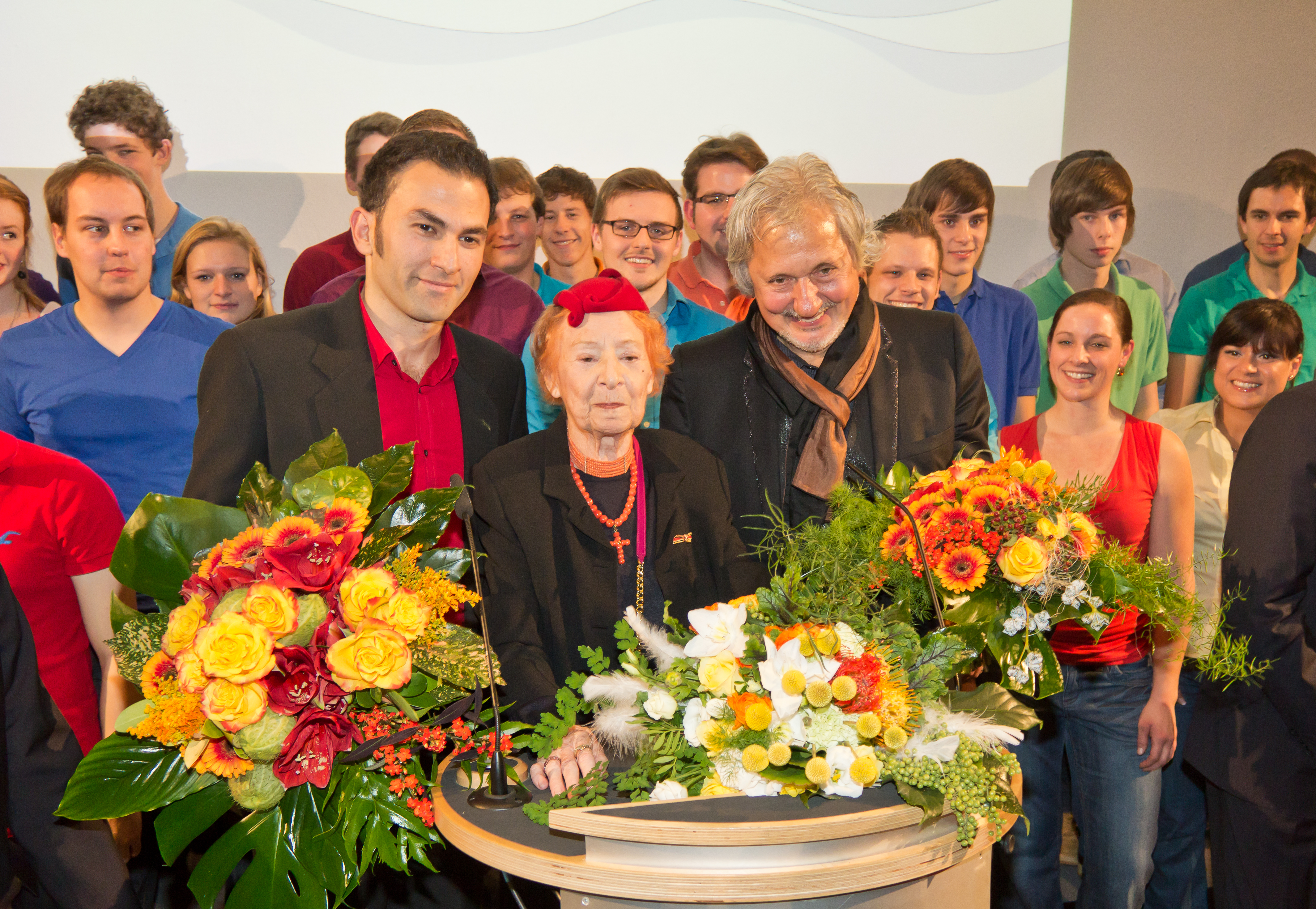 Verleihung des Rheinischen Kulturpreises der Sparkassen-Kulturstiftung Rheinland in der Piazetta des historischen Rathauses von Köln an Alexandra Kassen. Abschluss der feierlichen Preisverleihung mit Gruppenbild Depicted people: Fatih Çevikkollu (Förderpreisträger), Alexandra Kassen (Preisträgerin) and Konrad Beikircher (Laudator, Kabarettist) – Hintergrund: Jugendchor St. Stephan